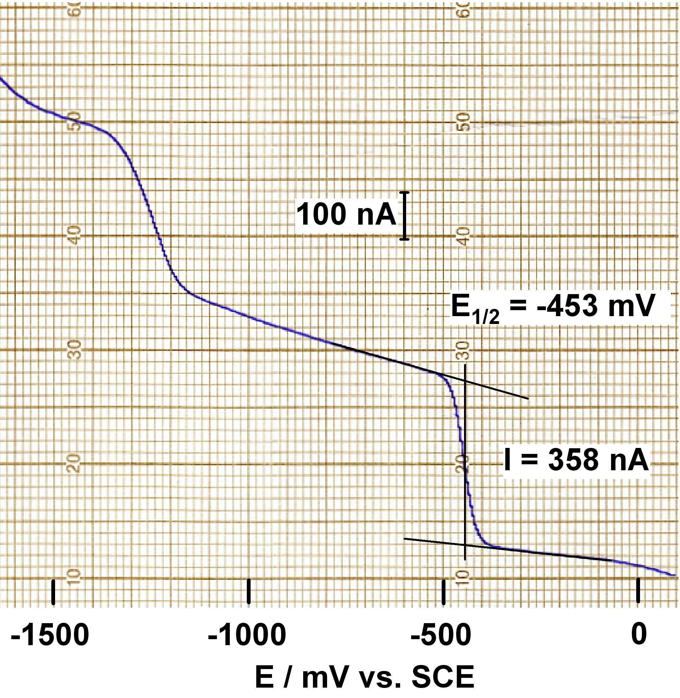 Polarogramm aufgenommen mit Tastpolarographie, Auswertung einer Stufe.